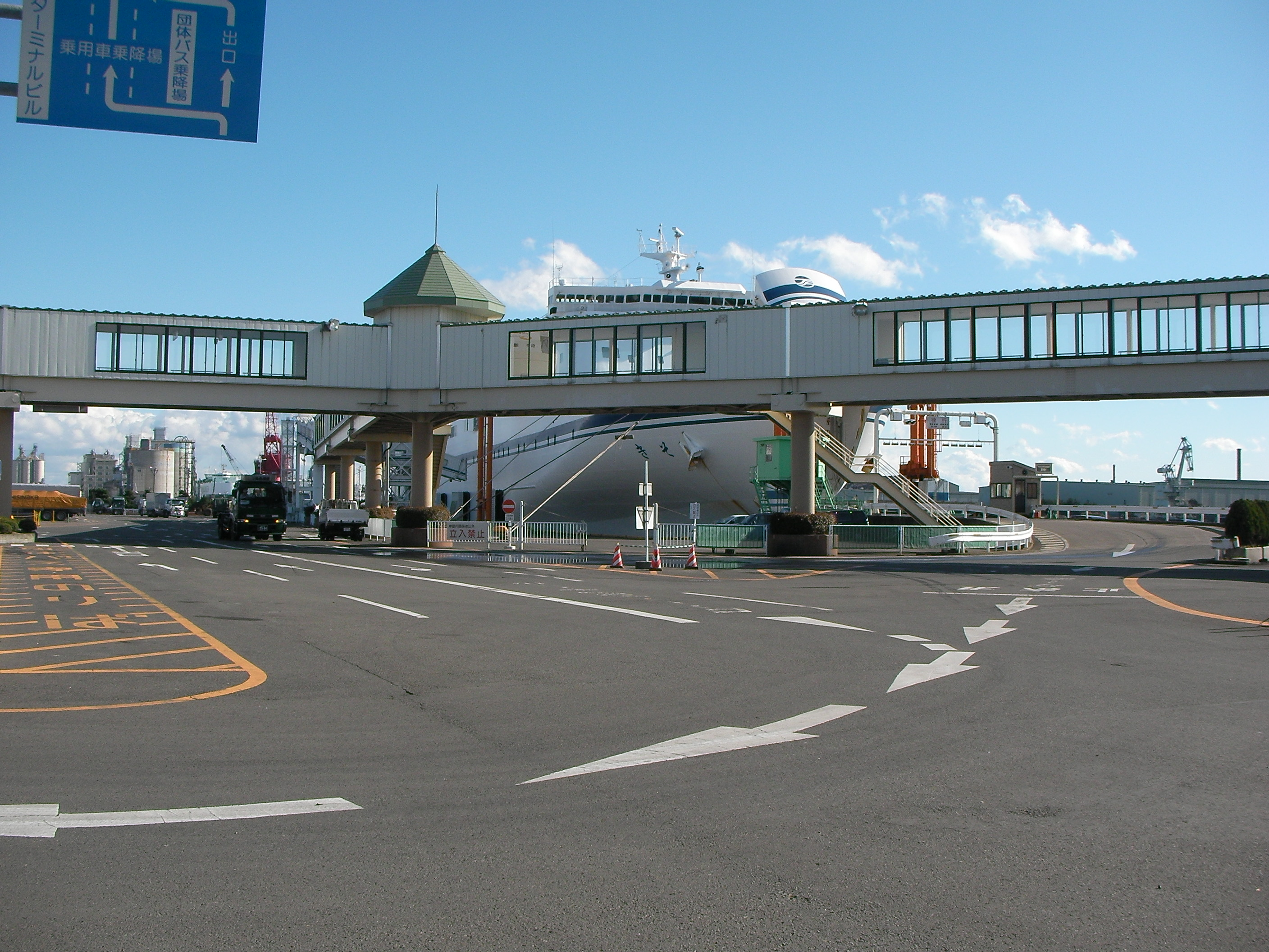 仙台港 フェリー埠頭